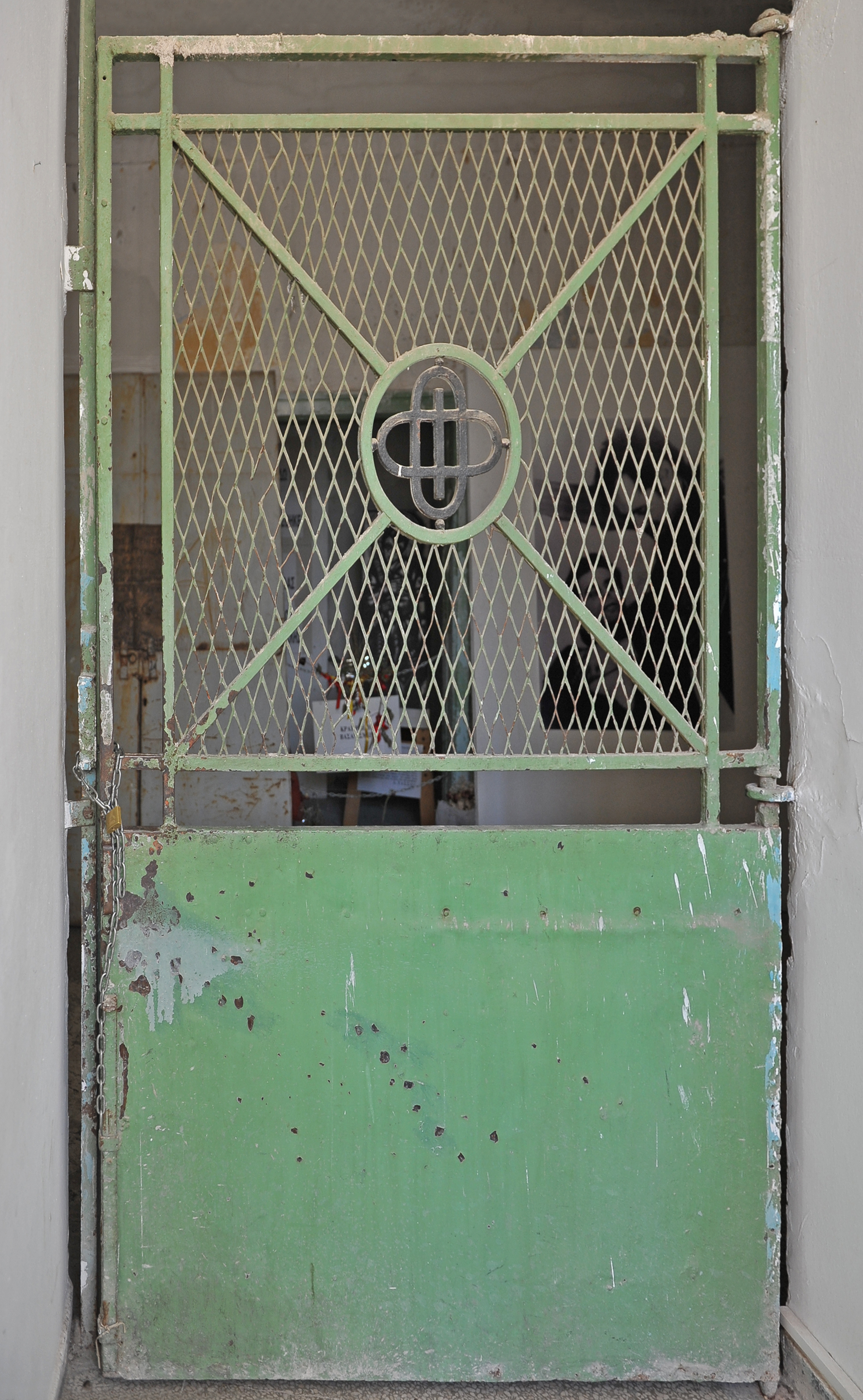 Εσωτερικό θύρωμα "Κτιρίου με τα Κελιά" (Κτ. 1), στο βάθος διακρίνεται το κελί που βασανίσθηκε ο Σπύρος Μουστακλής.